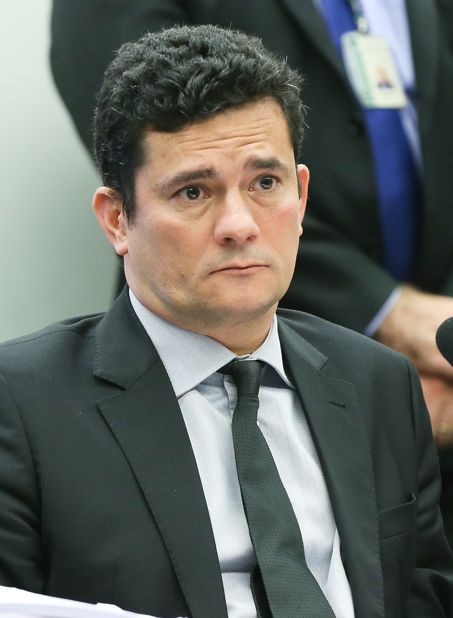 Brasília- DF 04-08-2016 Juiz Sergio Moro na comissão especial de combate a corrupção. Foto Lula Marques/Agência PT